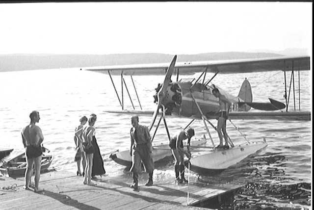 Widerøe Waco RNF at Ingierstand in Oppegård